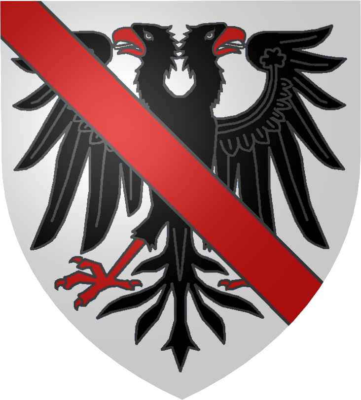 blason de Bertrand du Guesclin, crée pour le Projet:Blasons